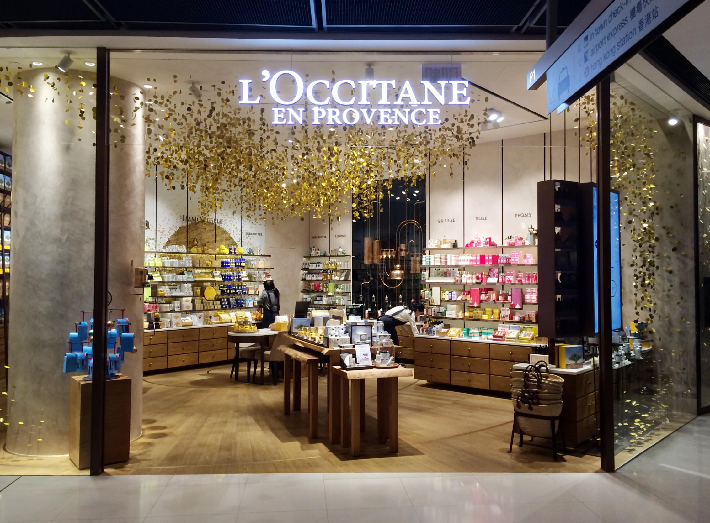 L'Occitane in ifc mall